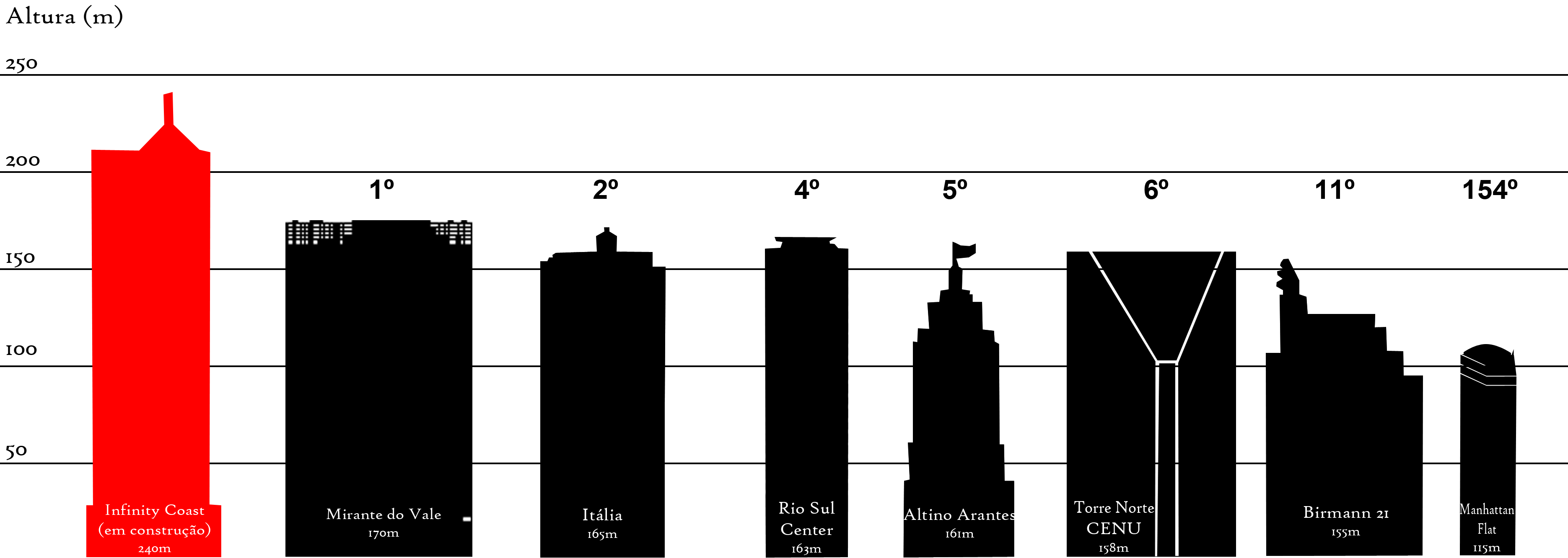 Este diagrama de autoria própria foi criado especialmente para o artigo Anexo:Lista de arranha-céus do Brasil, na Wikipédia em Português. Aqui, é feita uma comparação entre os mais altos edifícios do país, com um edifício previamente em construção e outro, selecionado aleatoriamente da lista no artigo.